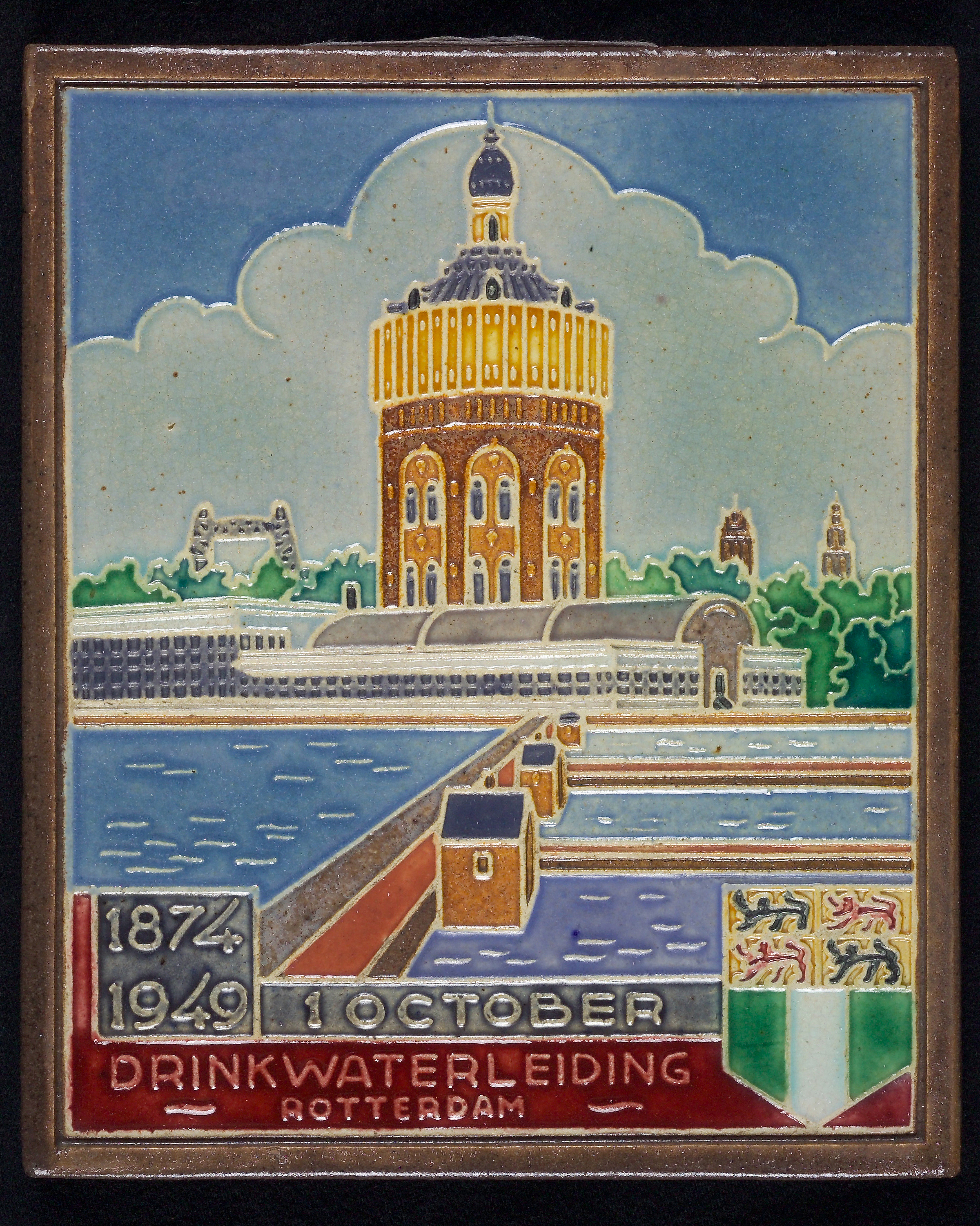 Objectgegevens Titel: Jubileumtegel met “1874 1949 1 october Drinkwaterleiding Rotterdam”, watertoren en stadswapen Beschrijving: Jubileumtegel met "1874 1949 1 october Drinkwaterleiding Rotterdam", watertoren en stadswapen Trefwoorden: jubileumtegel, siertegel, tegel, Opschrift / merk: "1874 / 1949", "1 OCTOBER / DRINKWATERLEIDING / ROTTERDAM" Vervaardiger: Westraven Plaats vervaardiging: Nederland, Utrecht Datering: 1949 Materiaal: keramiek, aardewerk, glazuur Afmetingen: (cm) hg 15,0 / br 12,4 / dp 1,2 Associatie: Rotterdam, drinkwater, heraldiek, jubileum, feest Vorm & decoratie: veelkleurig, polychroom, wapen, stadswapen, watertoren Inventarisnr: Museum Rotterdam 67939